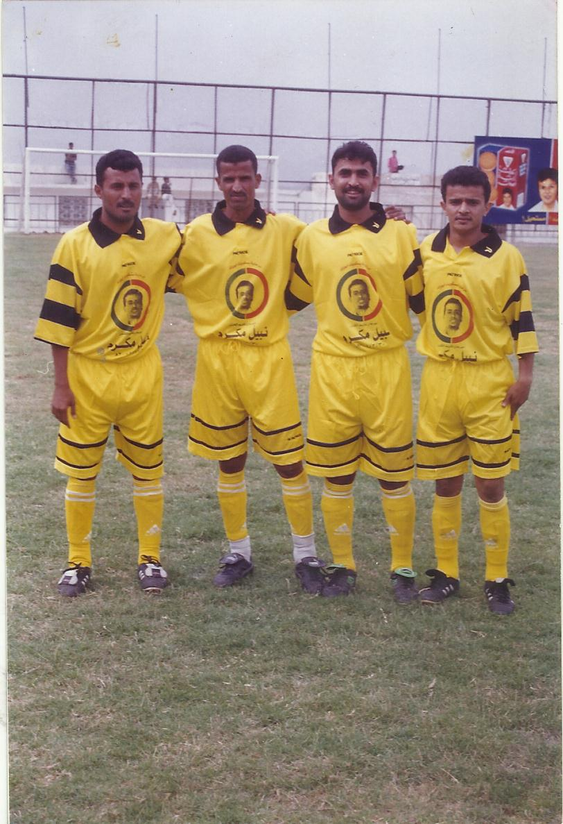 الكابتن أسعد في إعتزال الكابتن نبيل مكرم وبجانبه الاعب عبدالإله عبدالحميد واللاعب علي سلطان واللعب عبداله الكاتب